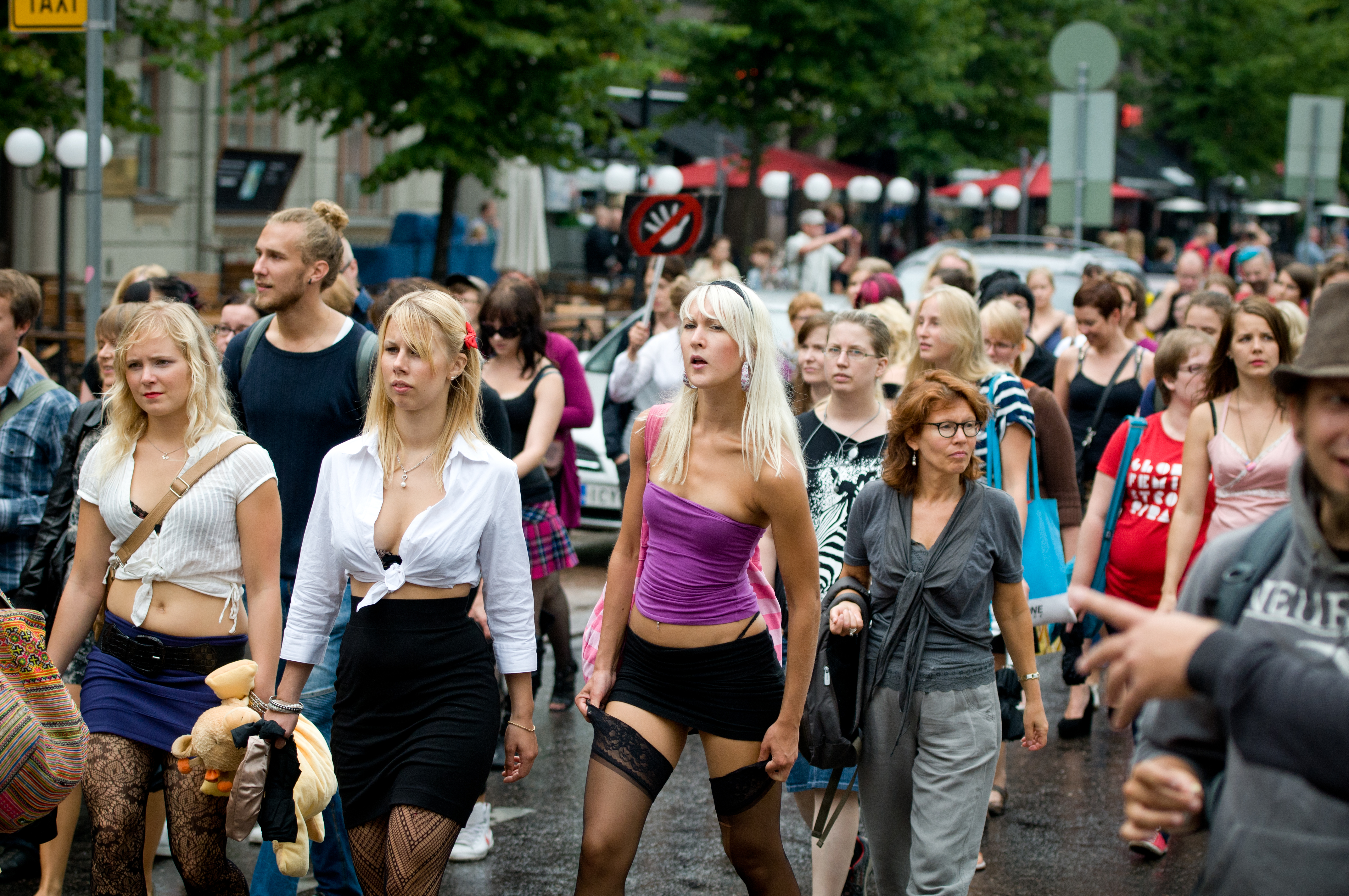 SlutWalk in Helsinki, 2011